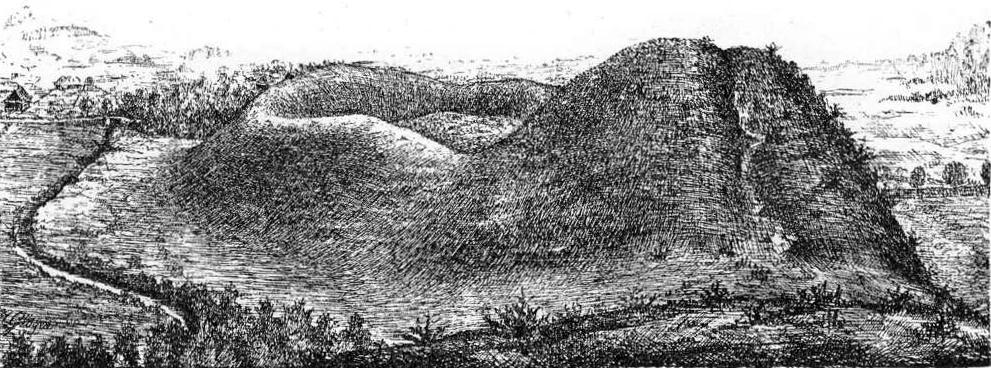 Ilustracja do „Encyklopedji staropolskiej ilustrowanej” Zygmunta Glogera.